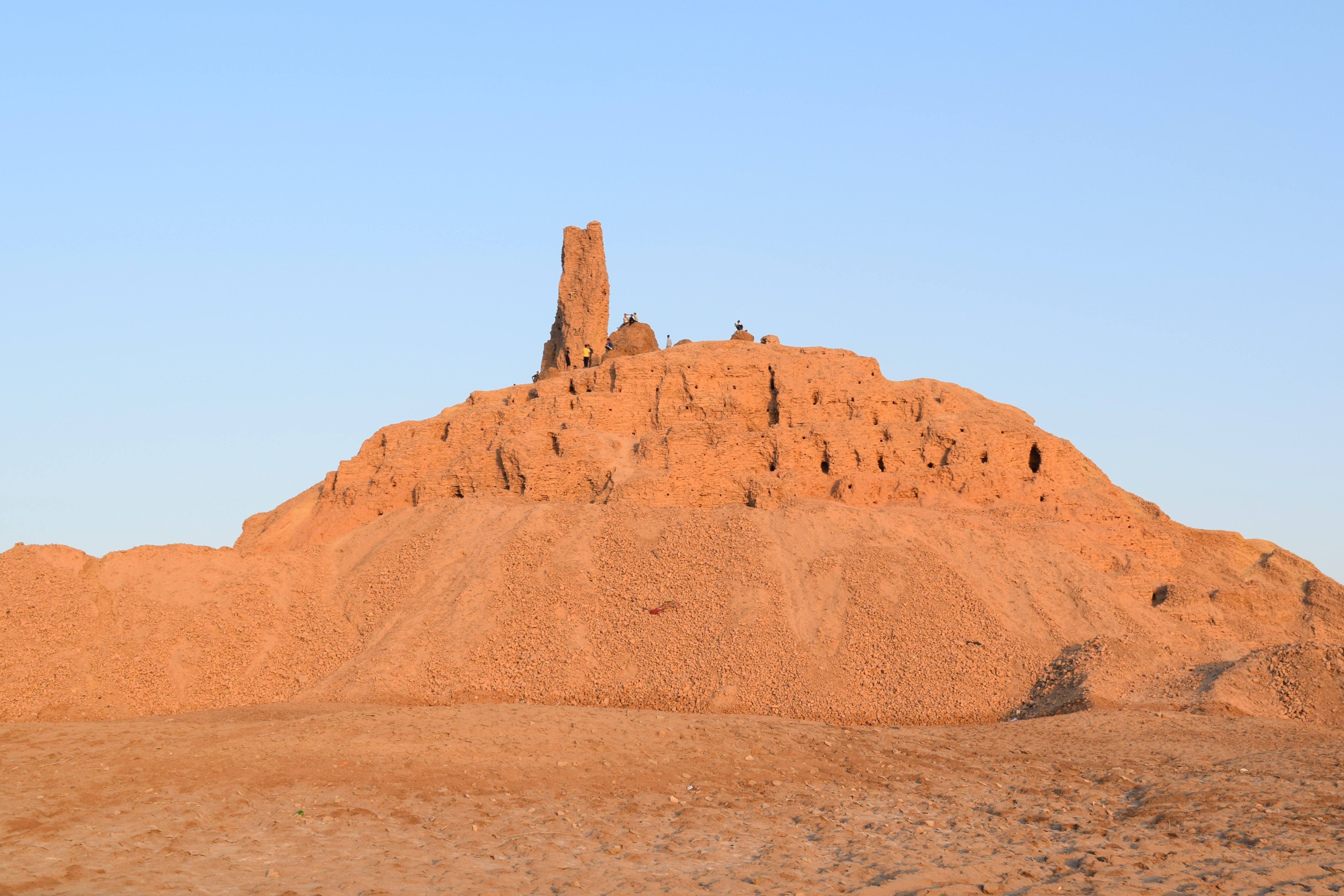 بقايا زقورة بورسيبا، في محافظة بابل، العراق.